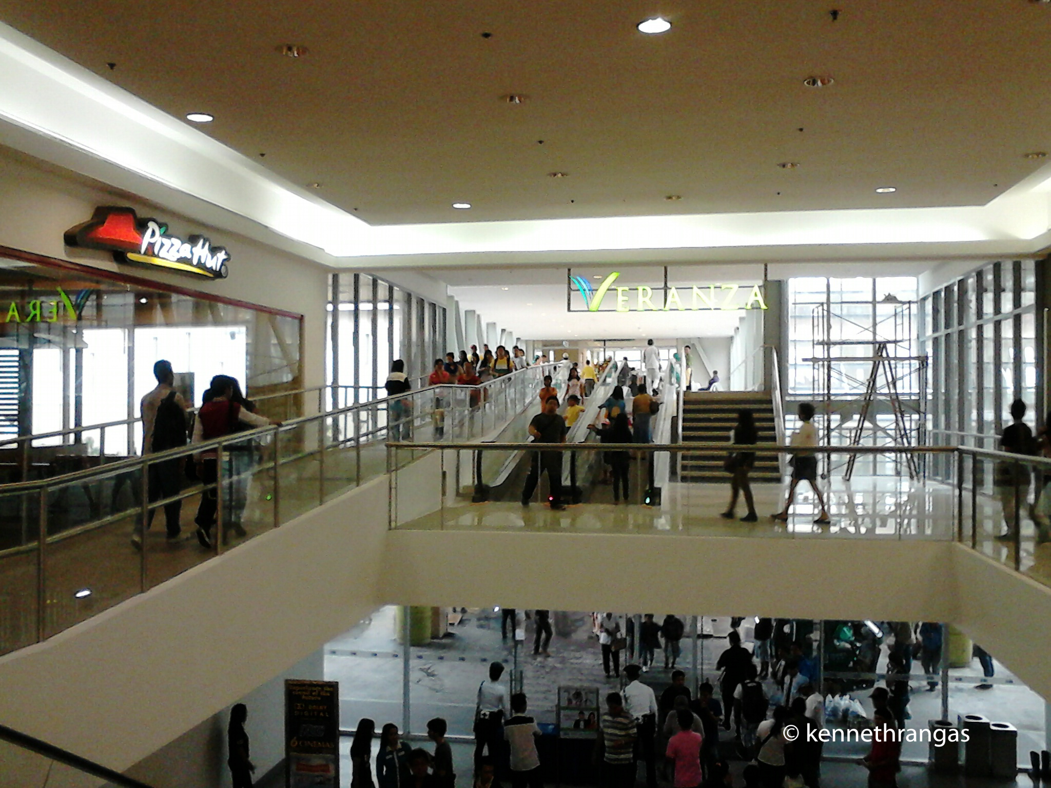 Veranza Mall entrance